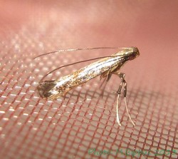 Phodoryctis caerulea (Meyrick, 1912) - raised from larvae on Canavalia sp.